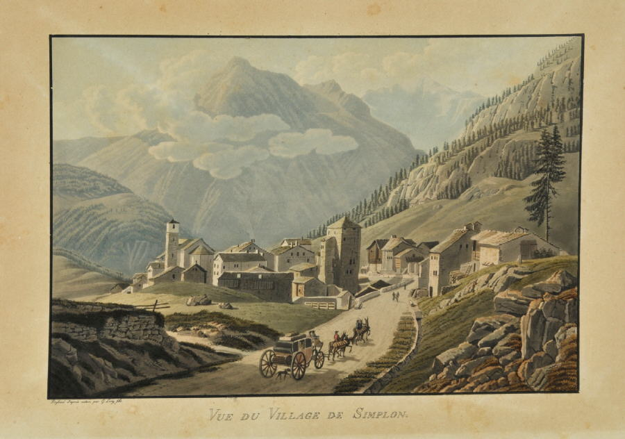 Vue du village de Simplon, Farbaquatintaradierung, 20 x 28,5 cm